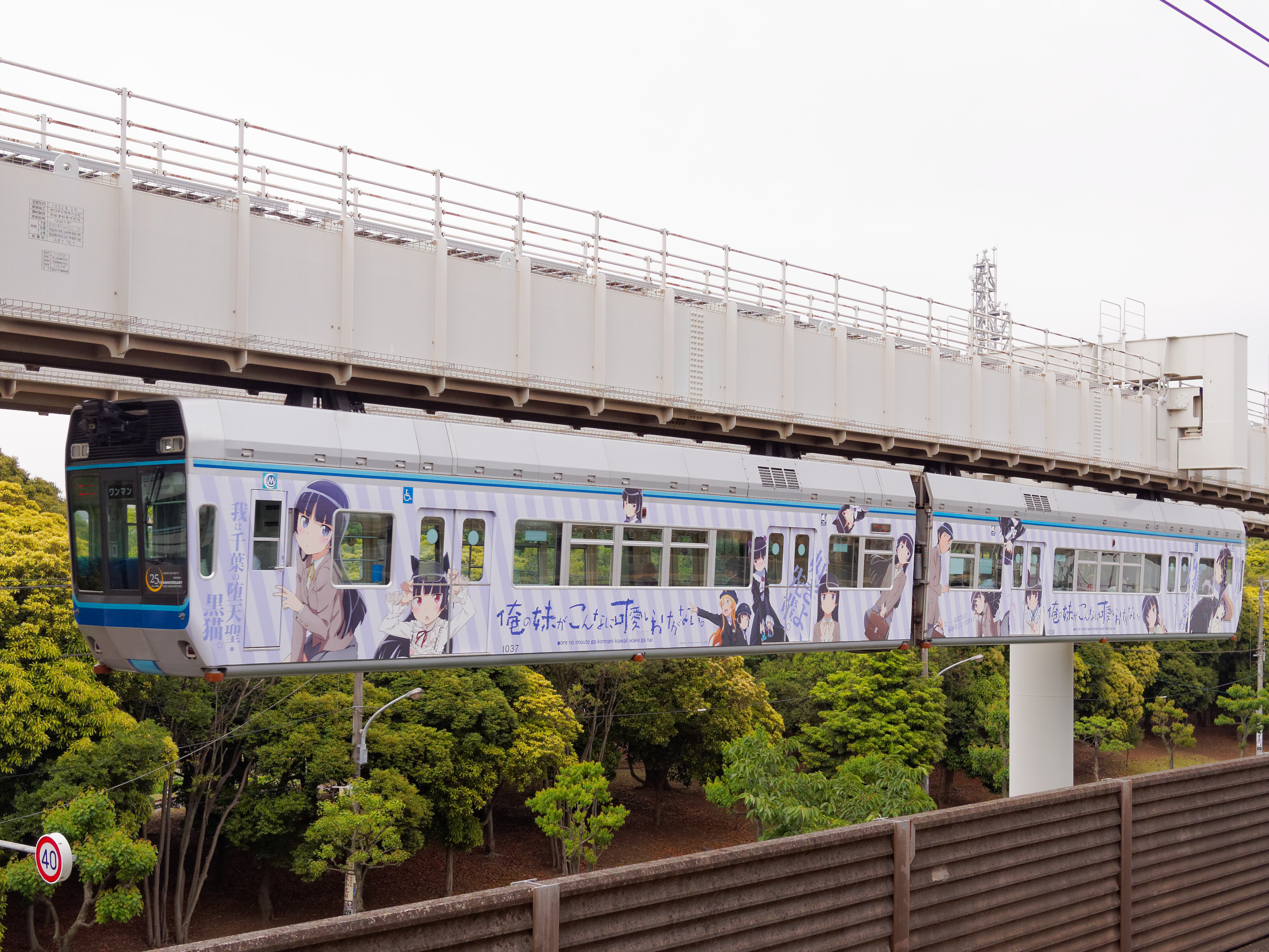 千葉都市單軌電車《我的妹妹哪有這麼可愛！》痛電車。